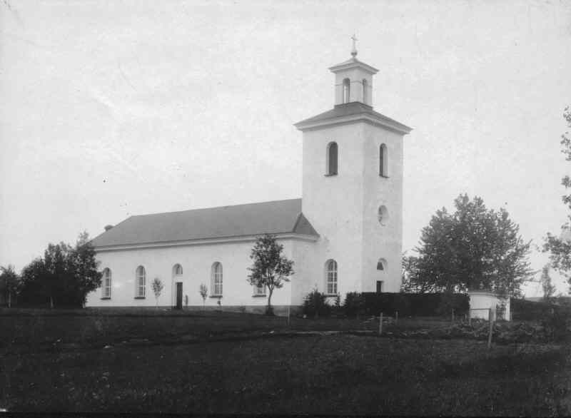 Kyrkan från nordväst.